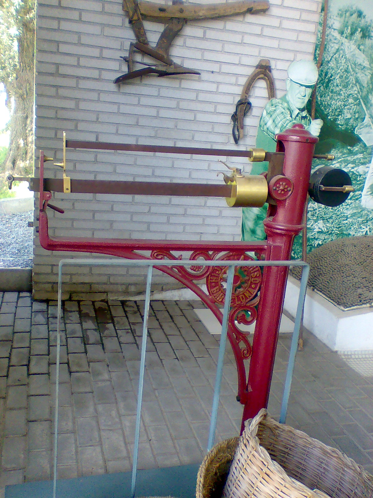 Báscula antigua ubicada en el Museo de las Ciencias de Granada